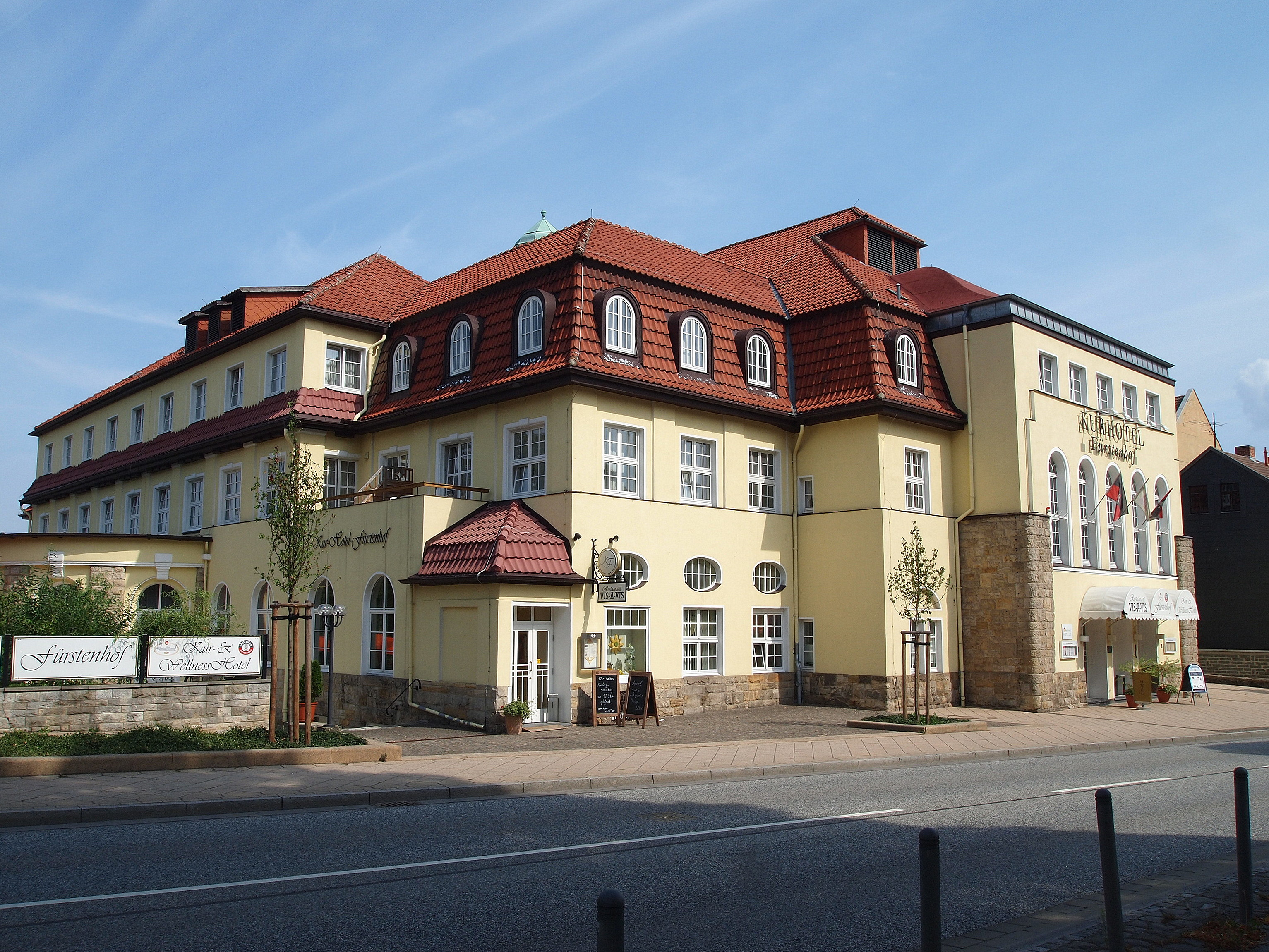 Blankenburg am Harz; Sachsen-Anhalt; Kur- und Wellness-Hotel "Fürstenhof"